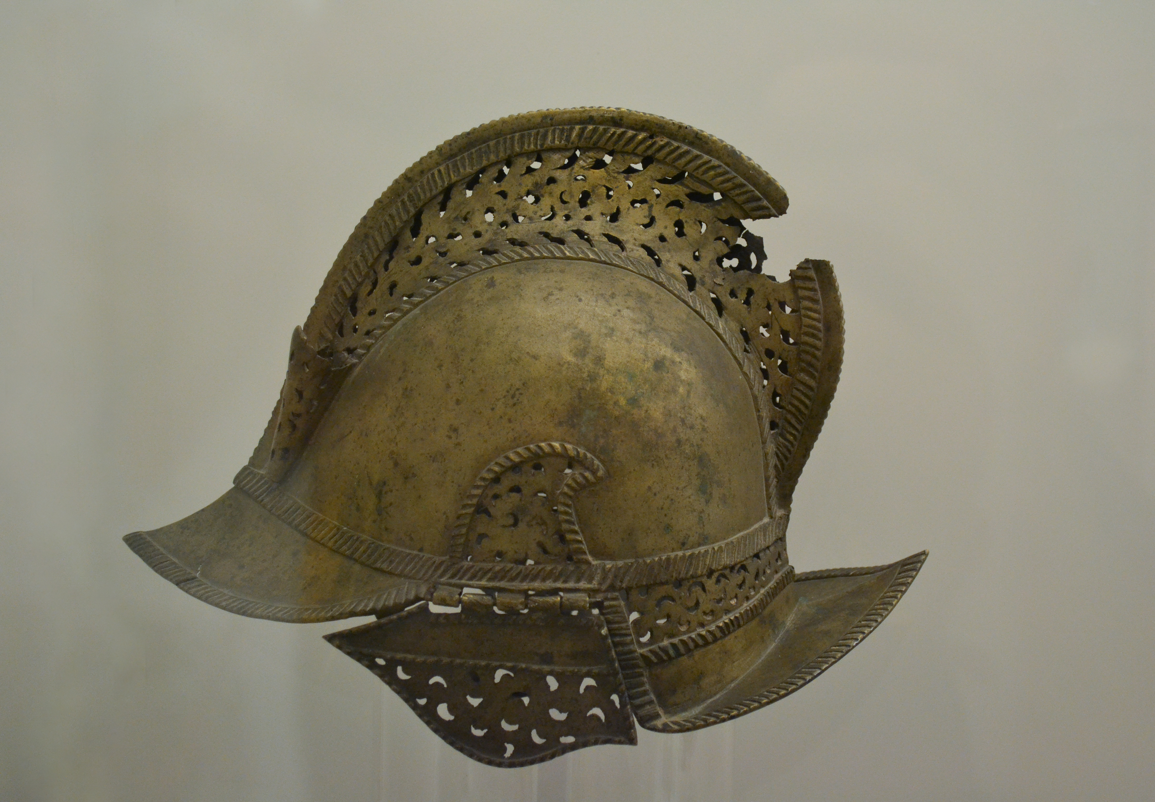 Casco de bronce de soldado español. Siglo XVI. Altura: 26 cm; anchura: 22,50 cm; profundidad: 35 cm. Nº inv. 13716. Museo de América.